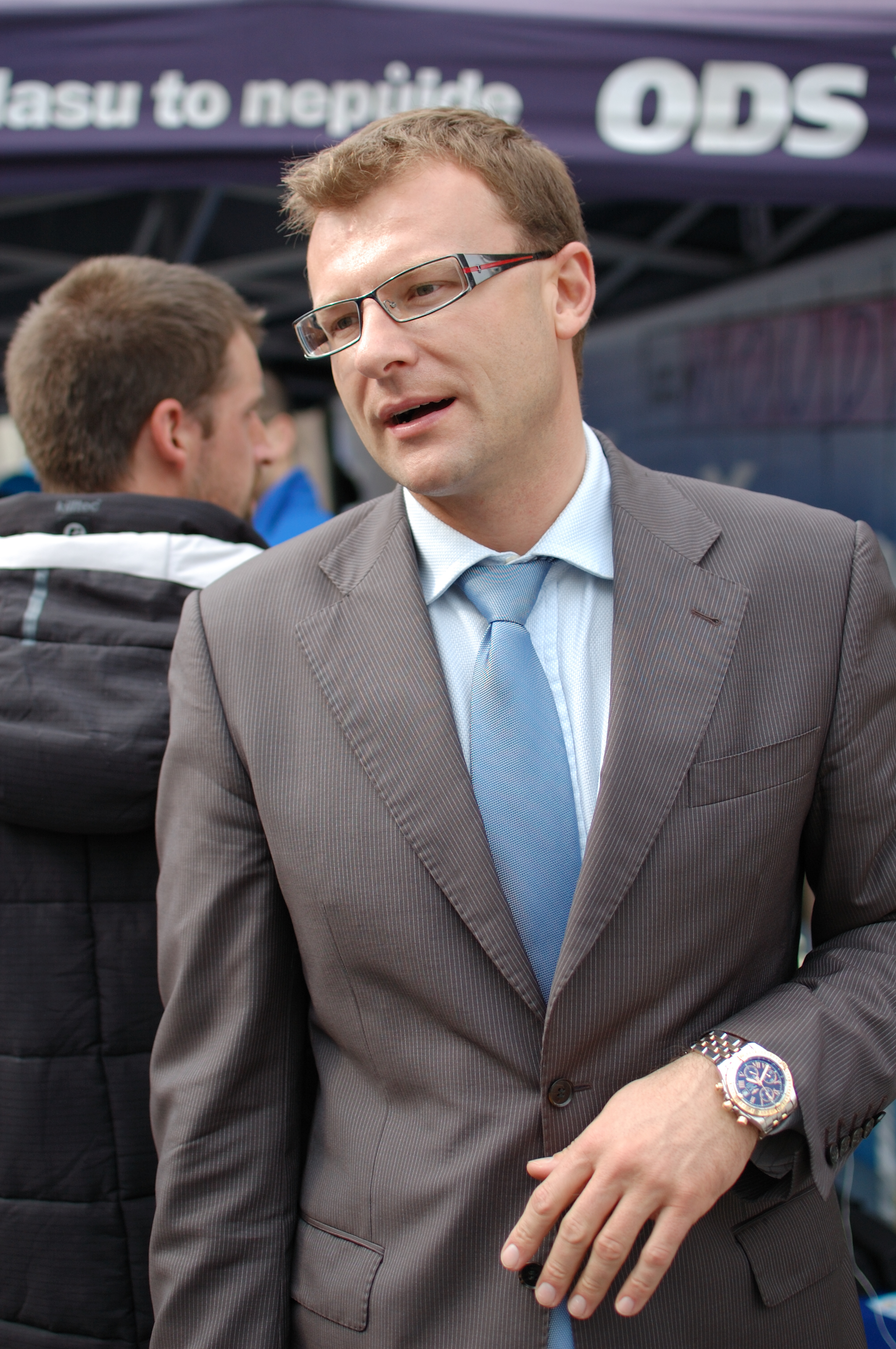 David Šeich